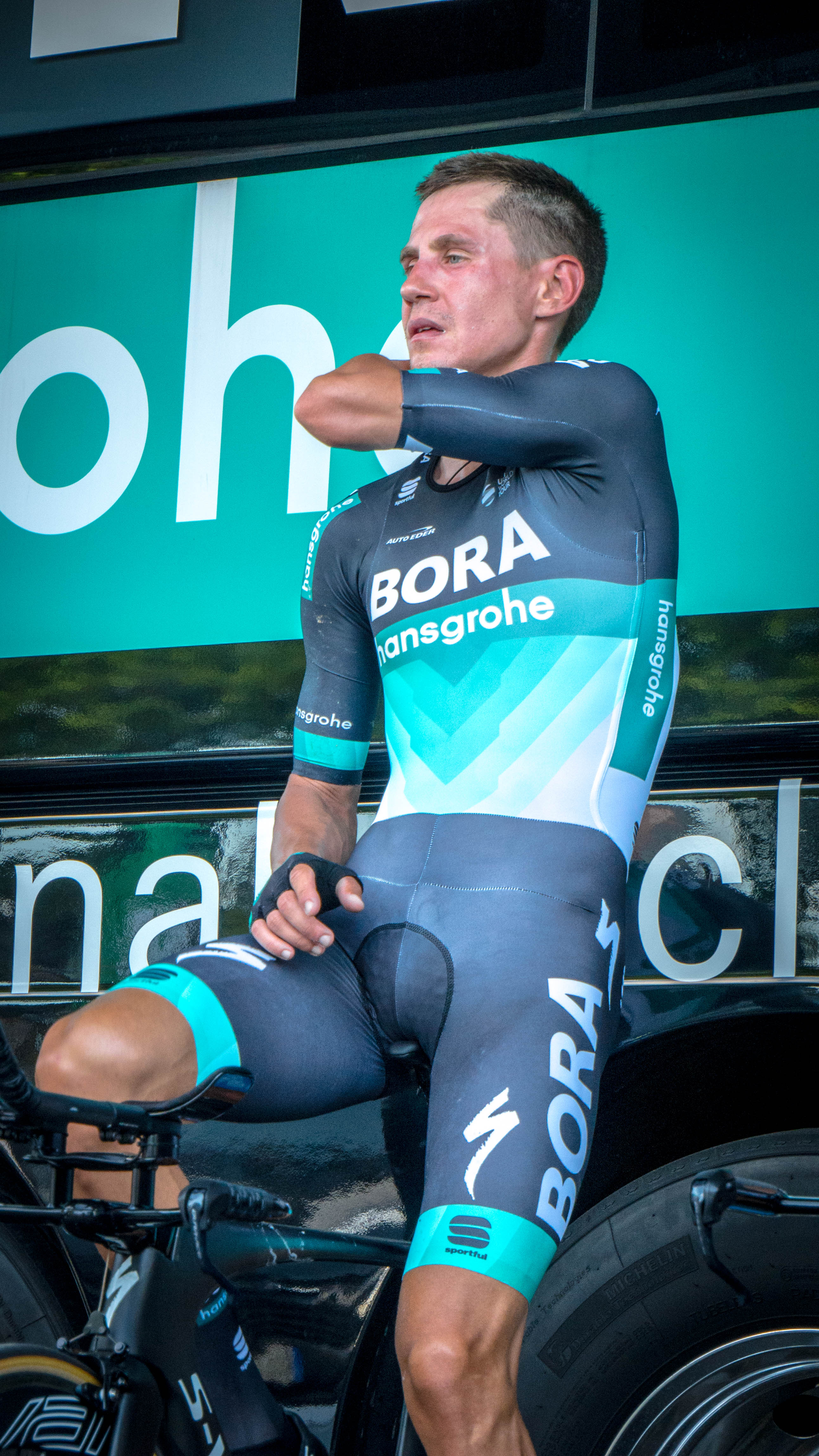 Tour de France 2018: etap 3 (TTT Warm Up)